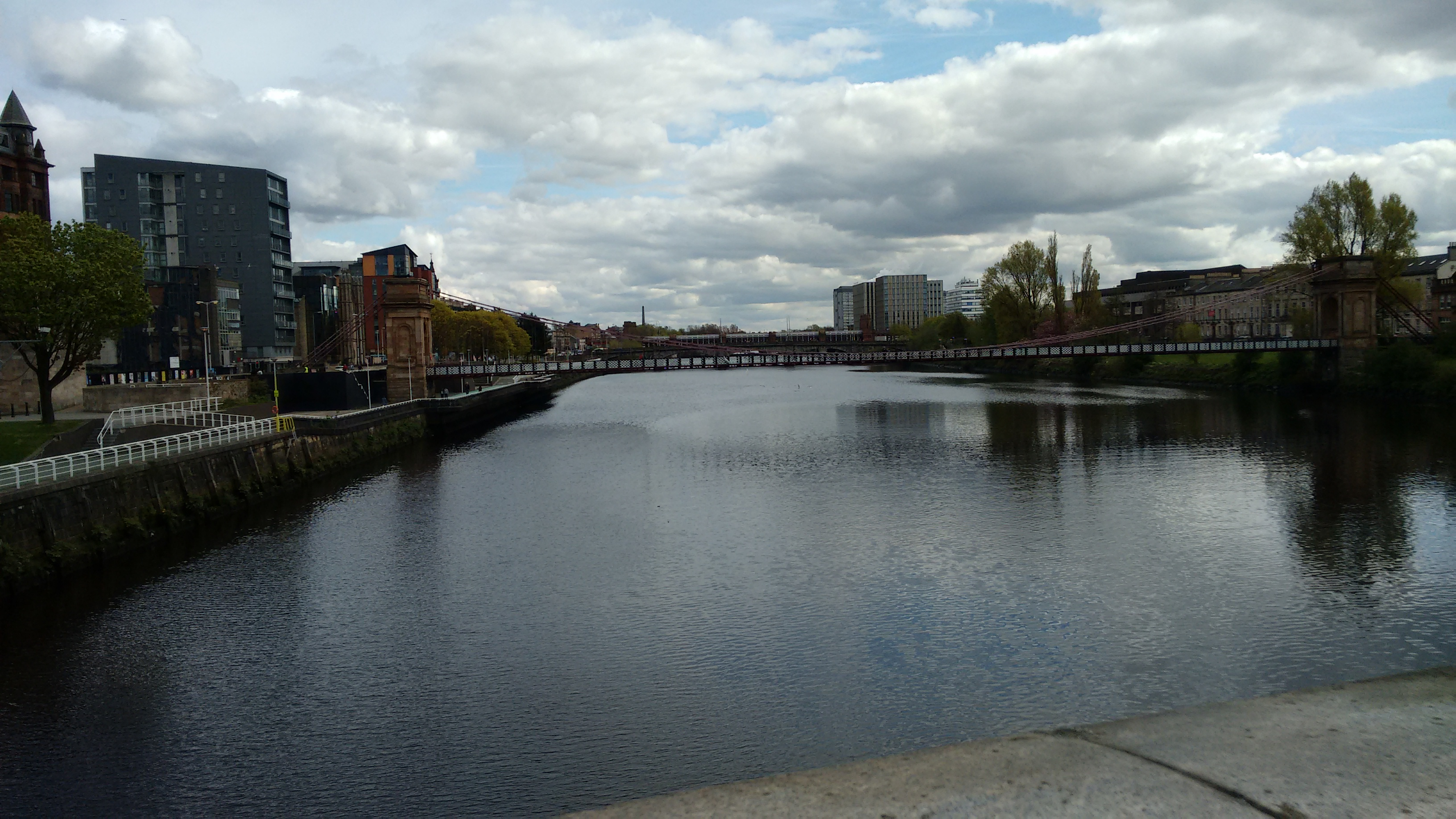 Imagem original utilizada para aplicar filtro de kuwahara